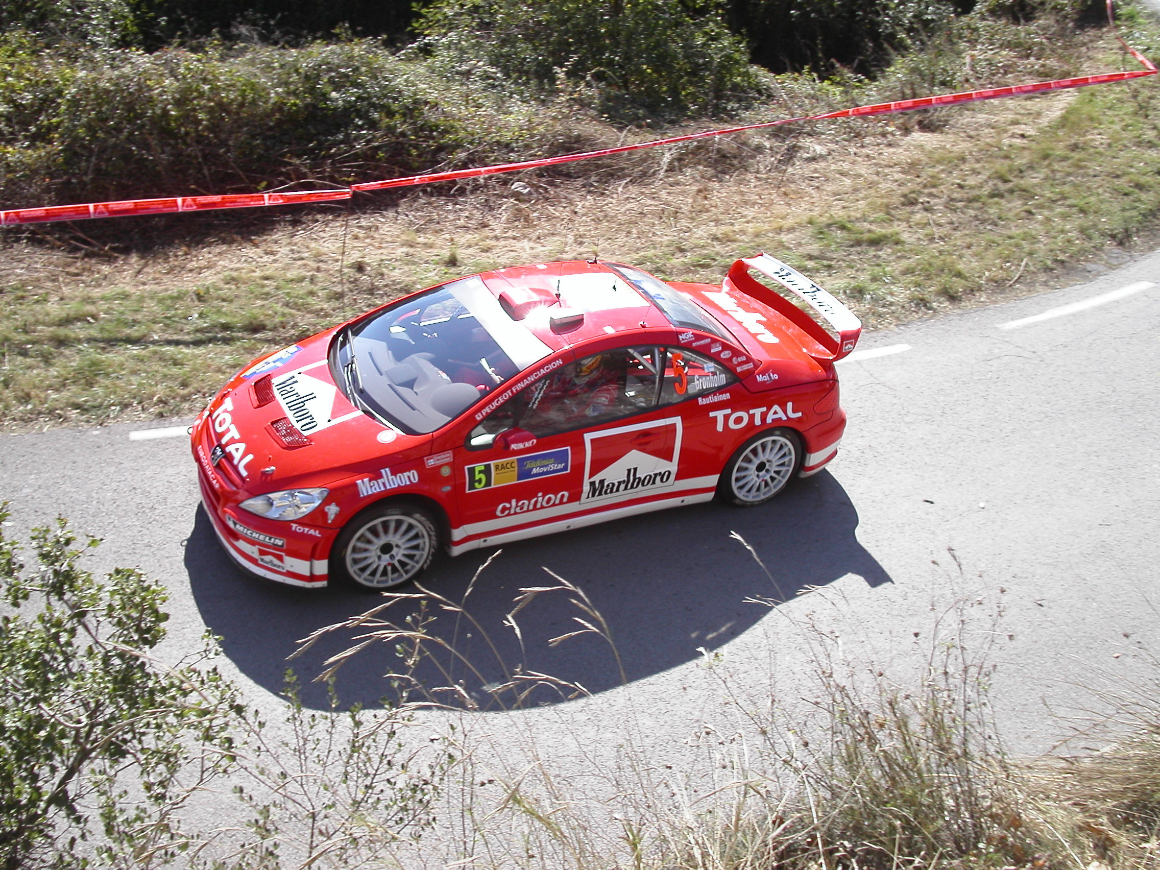 Gronhölm, Rally Catalunya 2004